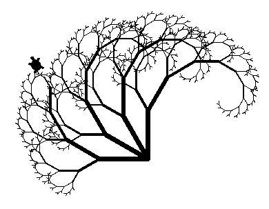 Пітонівська черепаха: малює гілочки